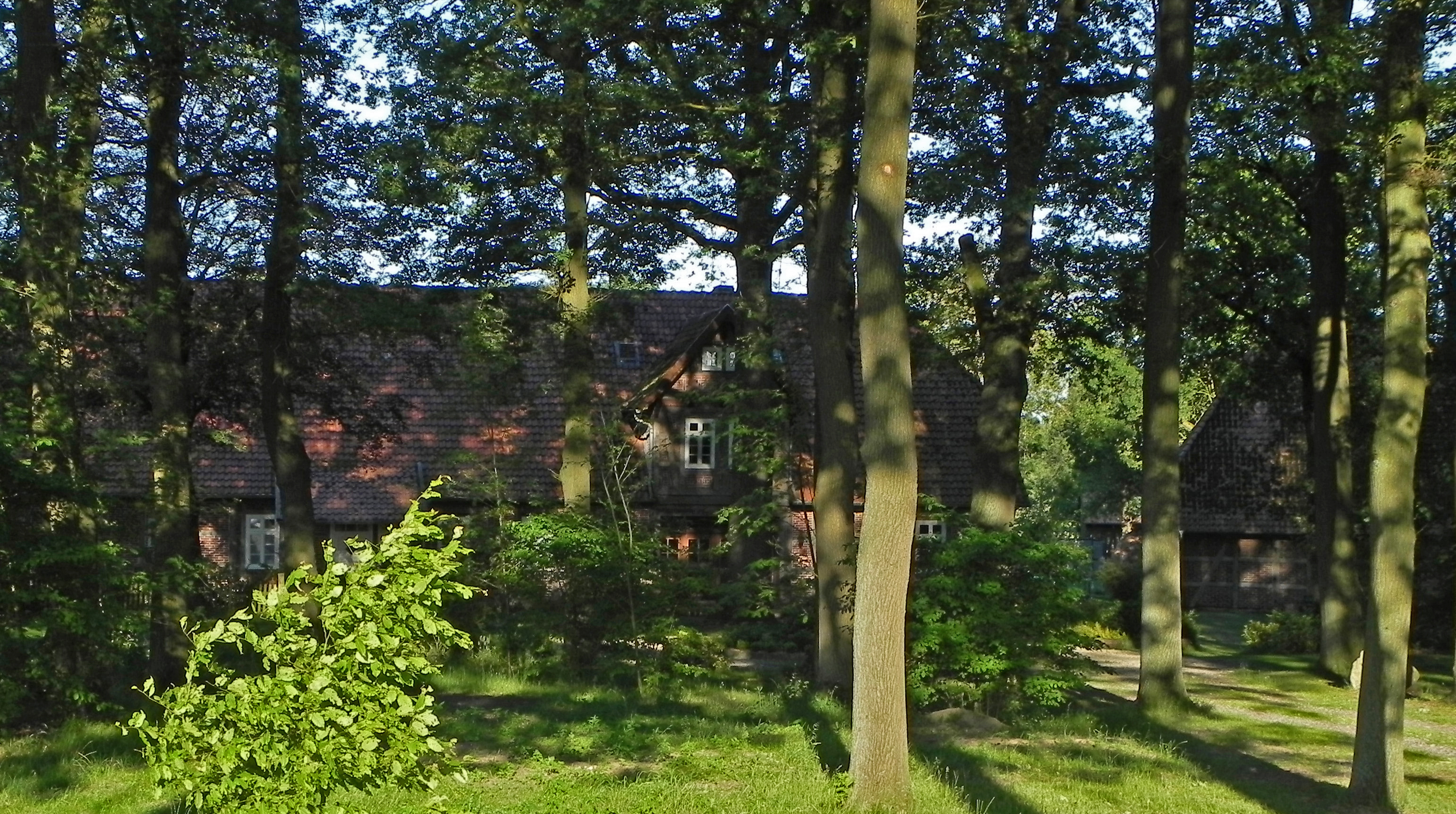 Bauernhof unter alten Eichen